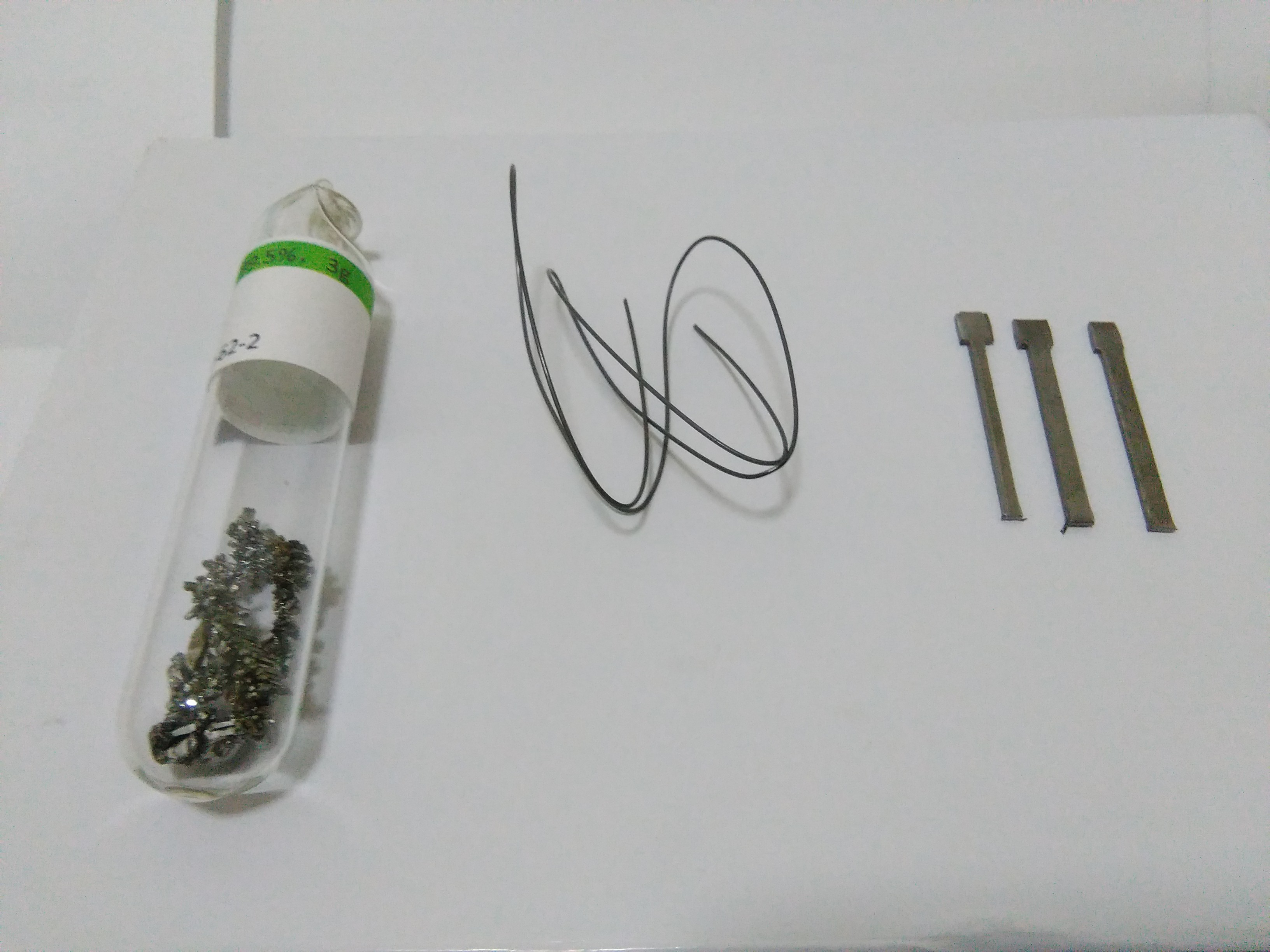 钒(V,99.5%,3g), 铌(Nb,99.9,1g), 钽(Ta,99.9,5g)